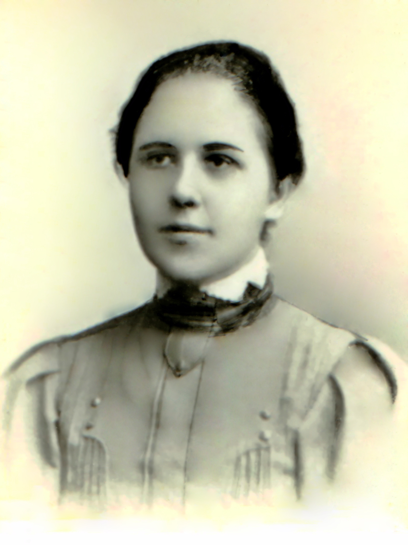 Миронова - Думнова Ольга Васильевна (1876-1946) – выпускница и учитель Мариинской женской гимназии г. Уфы, преподаватель Приуральского чувашского педагогического техникума, кавалер ордена Трудового Красного Знамени, автор книг «География Уфимской губернии» (1907), «География Башкирии» (1926).